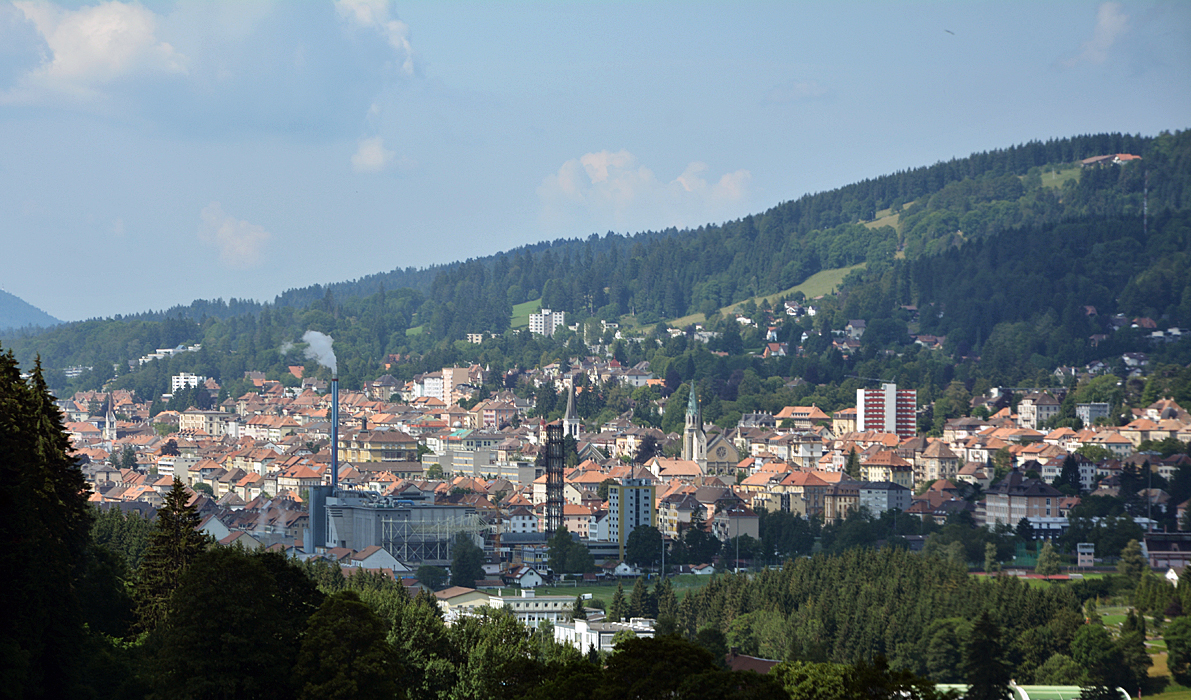 Blick auf die Stadt La Chaux-de-Fonds